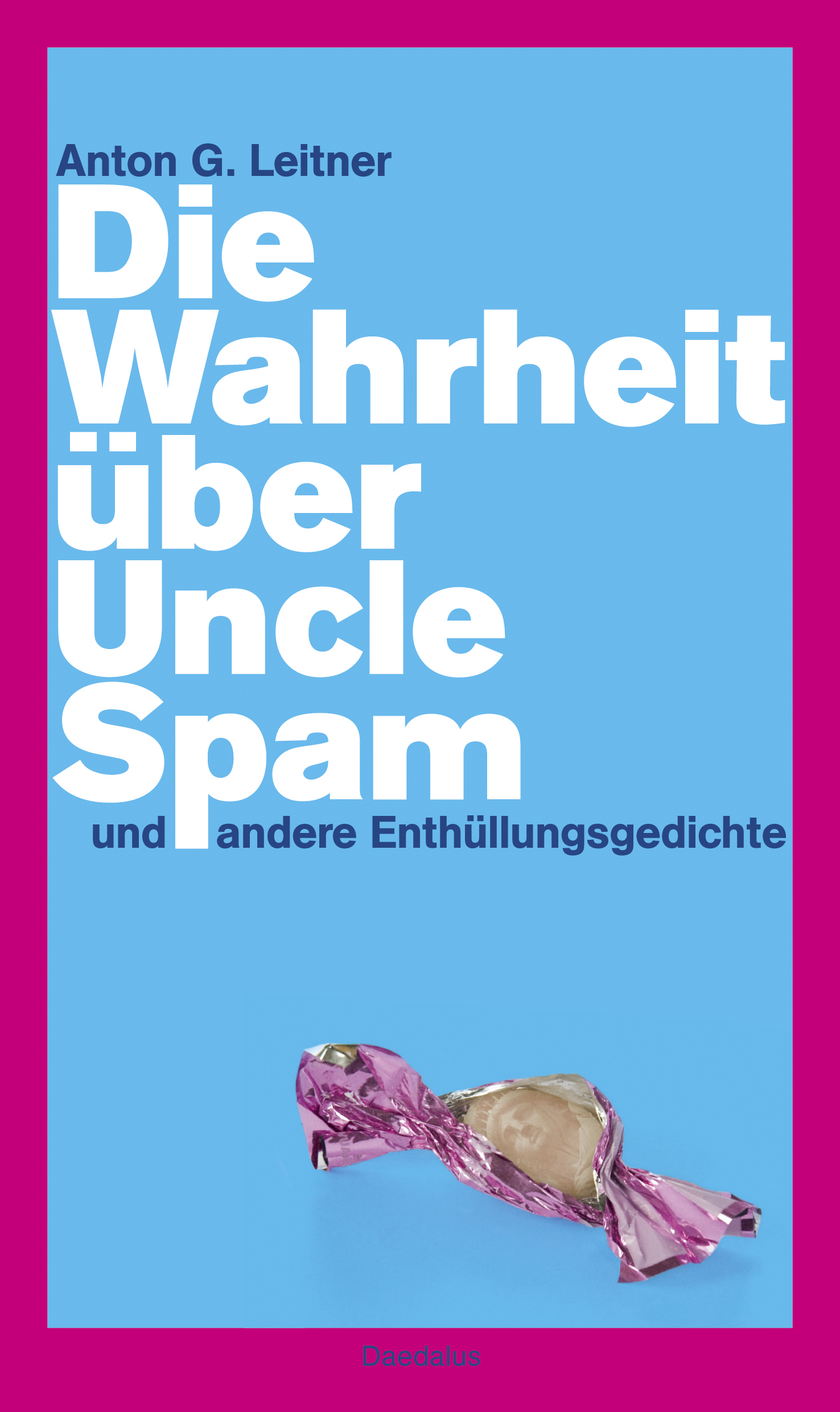 Cover-Gestaltung von Peter Boerboom & Carola Vogt, Münsing, für den Daedalus Verlag, Joachim Herbst e. K., Münster